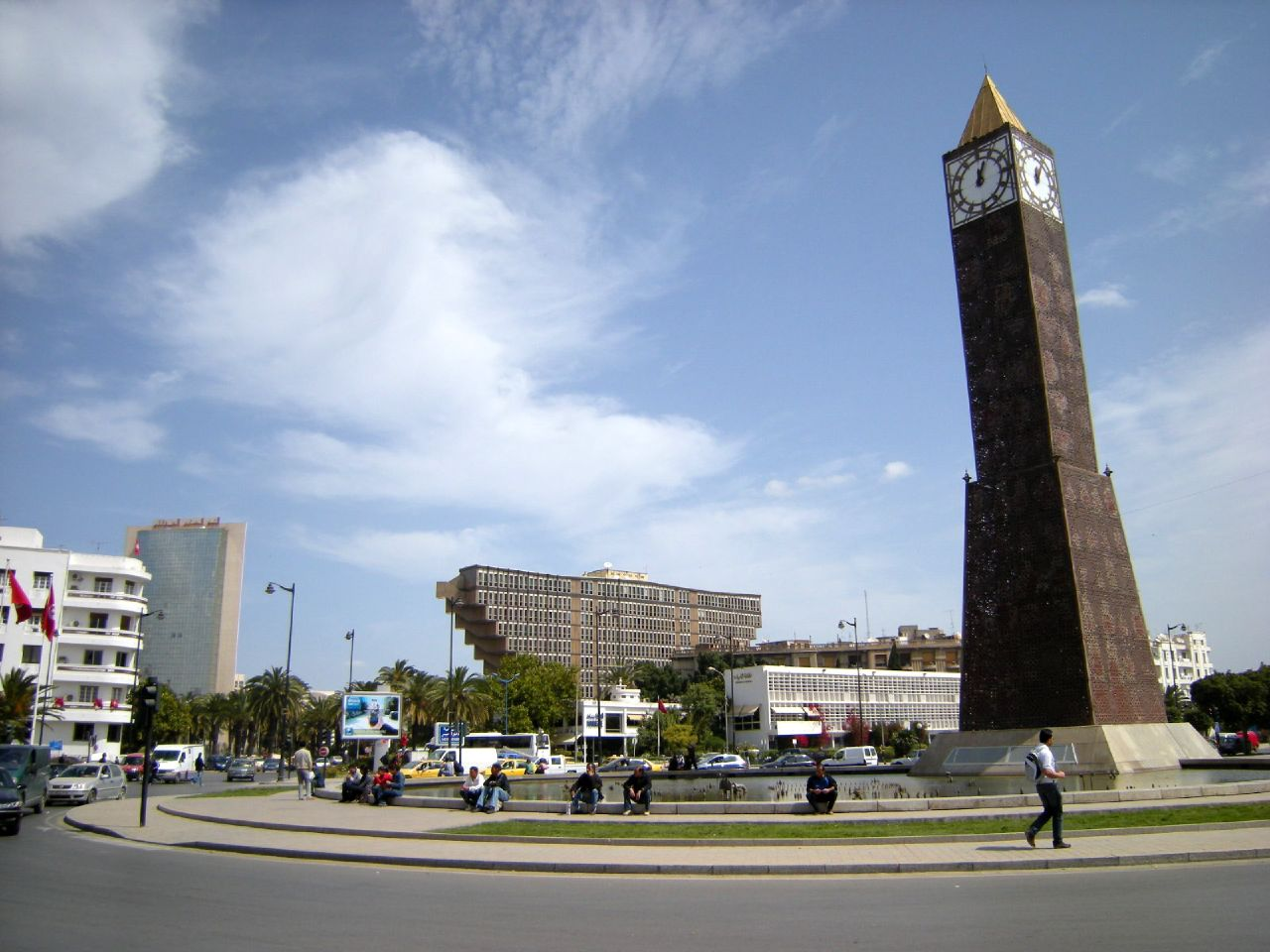 Place du 7-Novembre, rebaptisée place du 14-Janvier, à Tunis avec son horloge. À l'arrière-plan figurent l'hôtel du Lac et sa forme en V et la tour du Rassemblement constitutionnel démocratique (parti au pouvoir de 1988 à 2011)